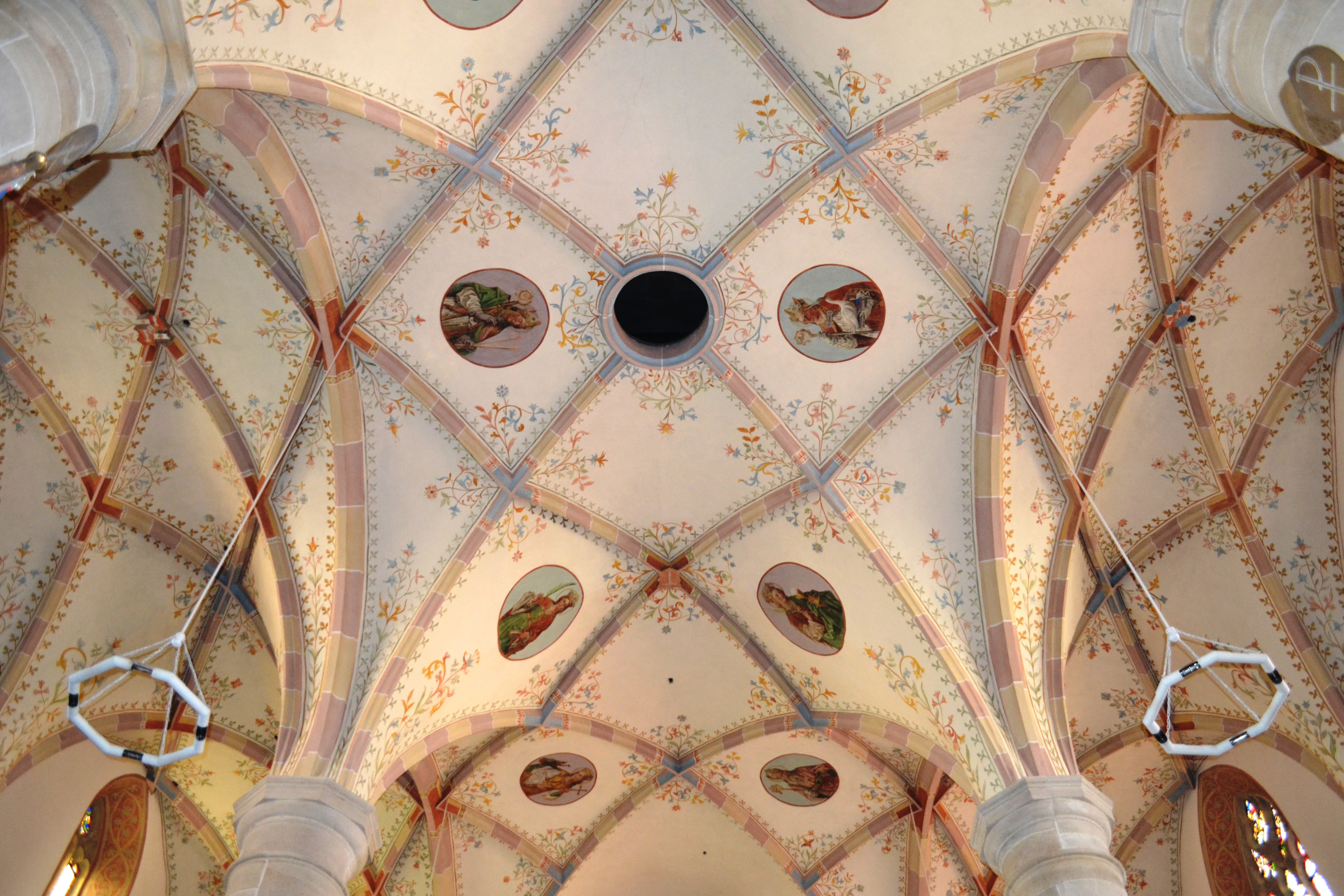 Deckenfresko Maria Himmelfahrt Völs am Schlern